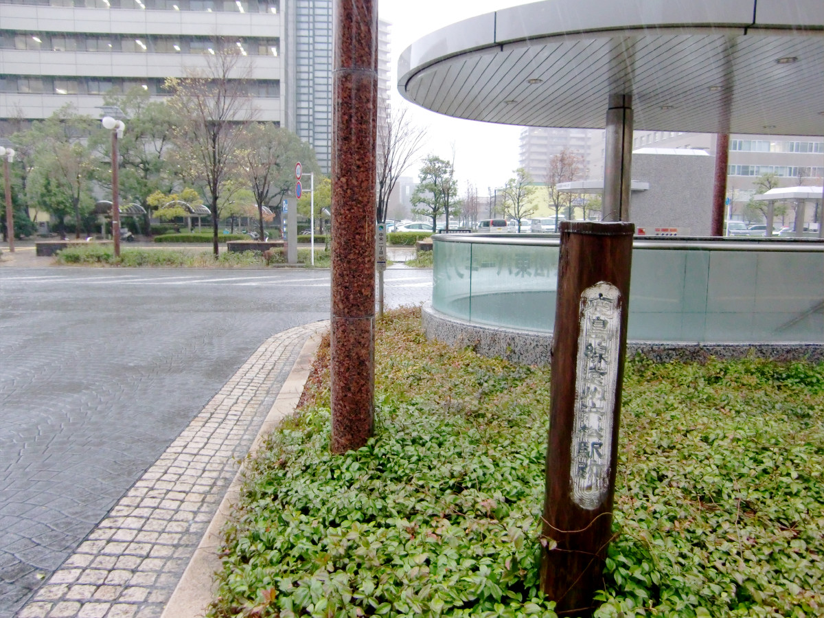 遠州浜松駅跡に建つ記念碑（浜松市中区）